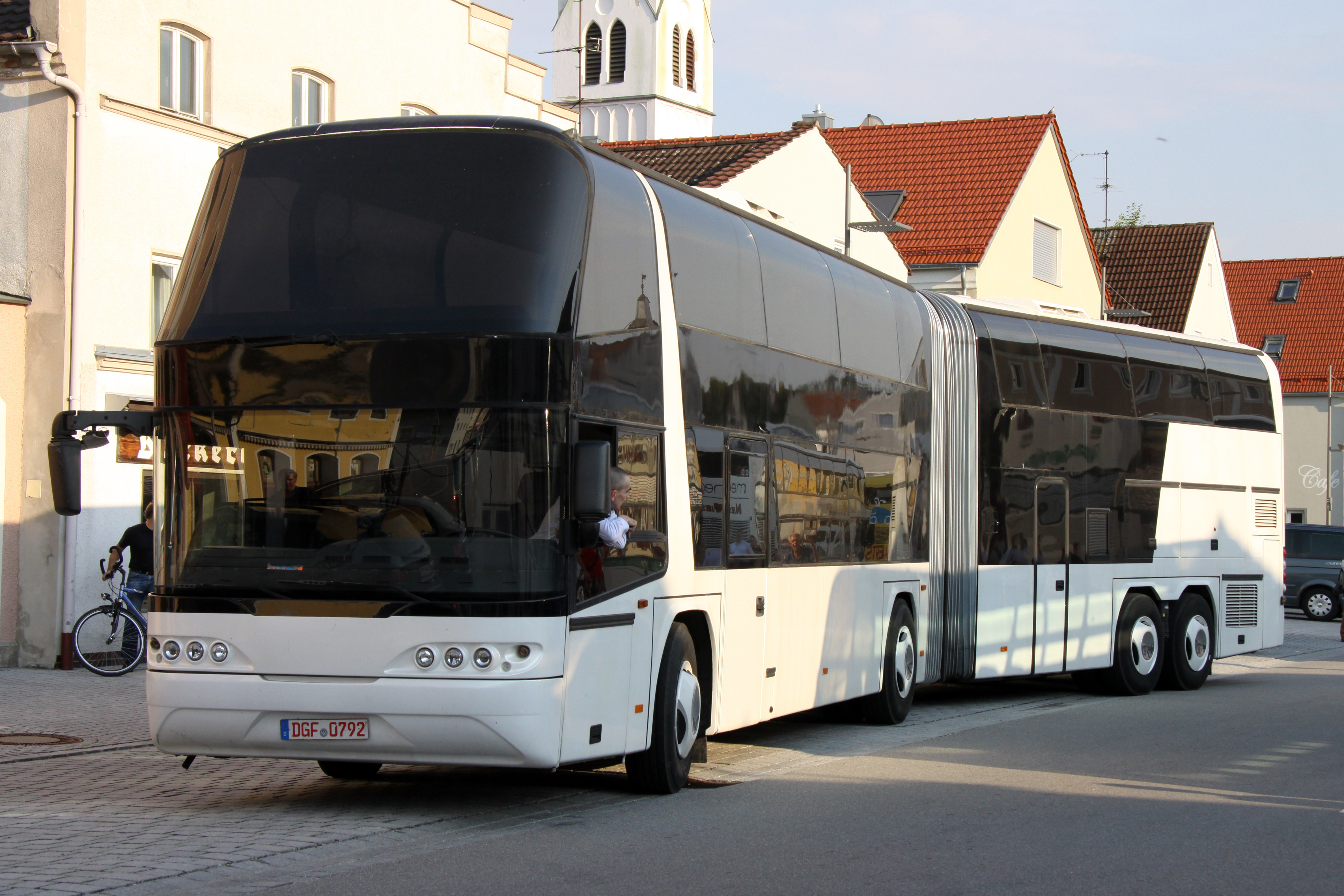 Last buildt Jumbocruiser 2015 in Pilsting (Bavaria/Germany)